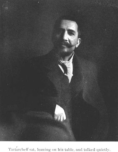 Христо Татарчев